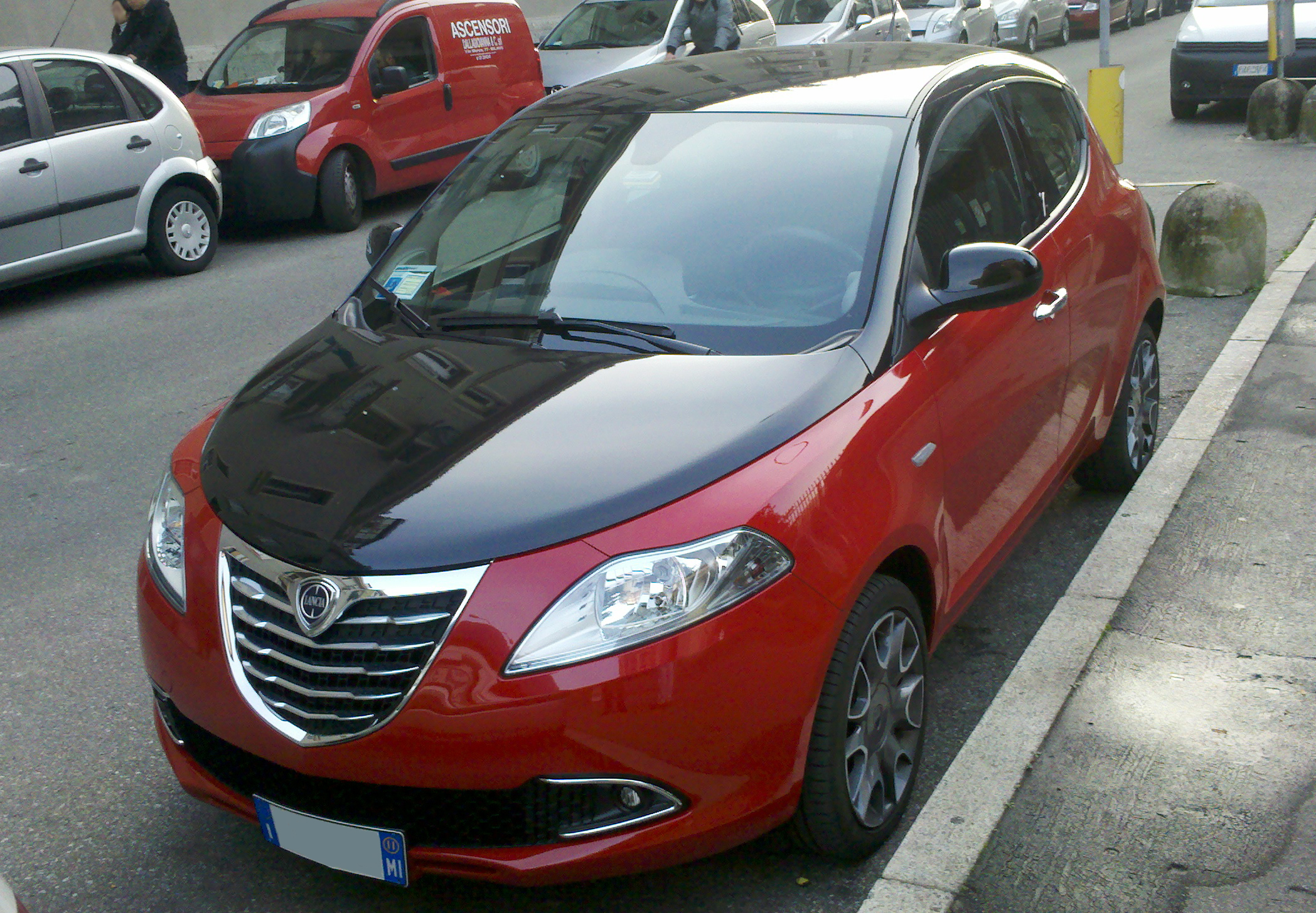 Una Lancia Ypsilon del 2011 a Milano